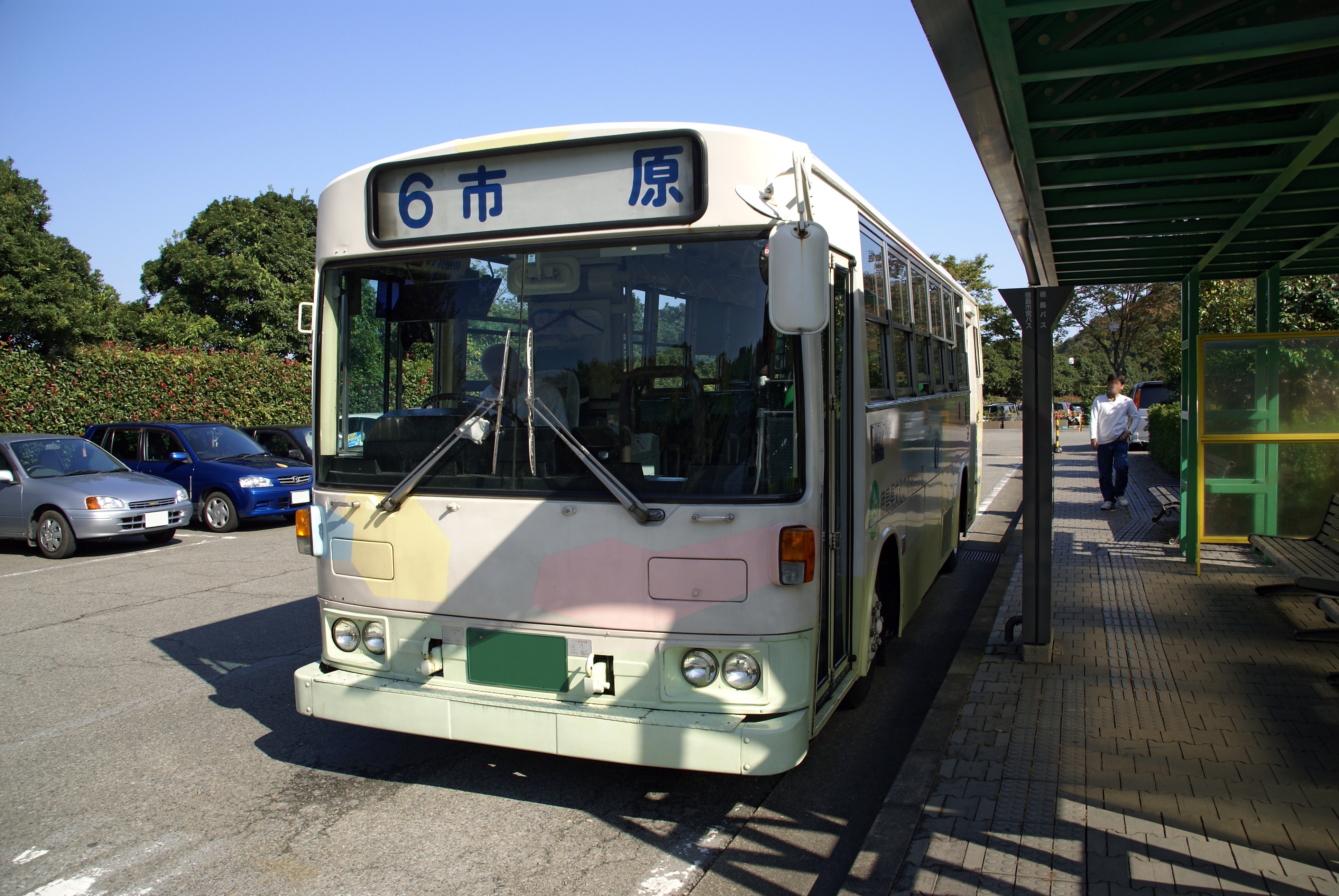 Tokushima Bunka-no-Mori Park in Tokushima, Tokushima prefecture, Japan